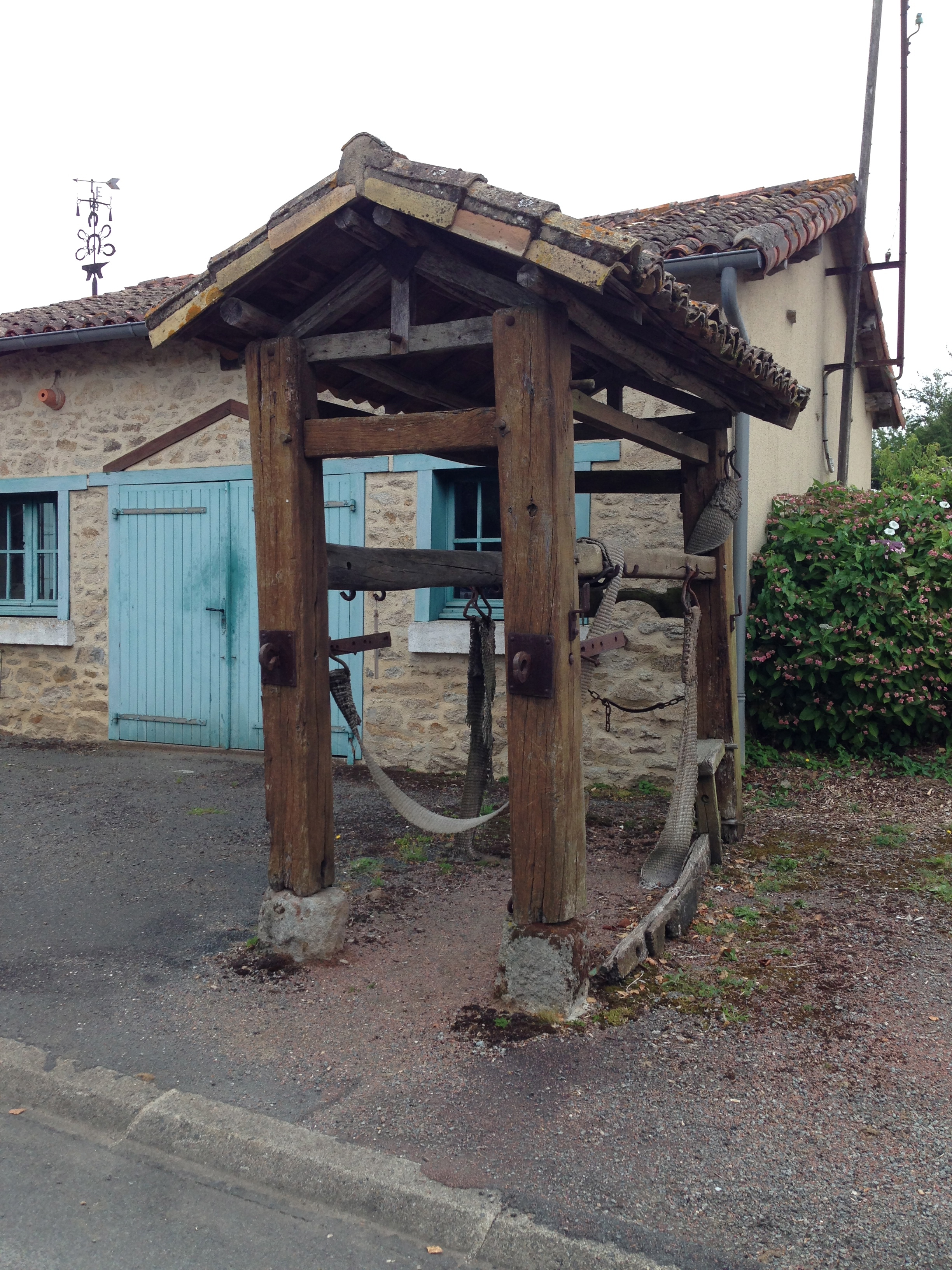 Bâtiment pour ferrer les chevaux Coutière, que l'on peut voir dans la rue.